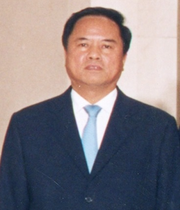 国家海洋局局长刘赐贵，摄于2012年